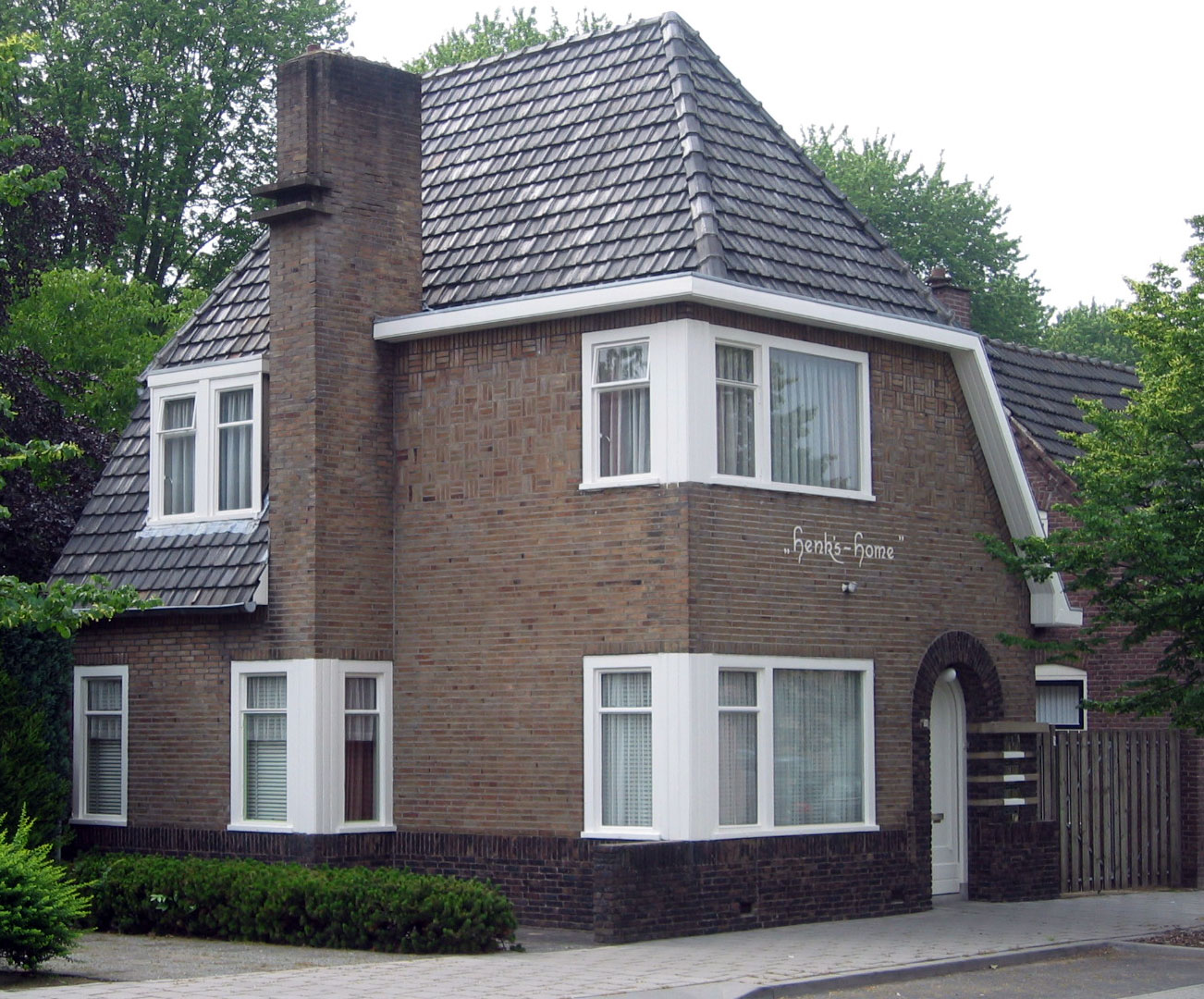 House, Hendrik Veenemanstraat 7, Son, The Netherlands